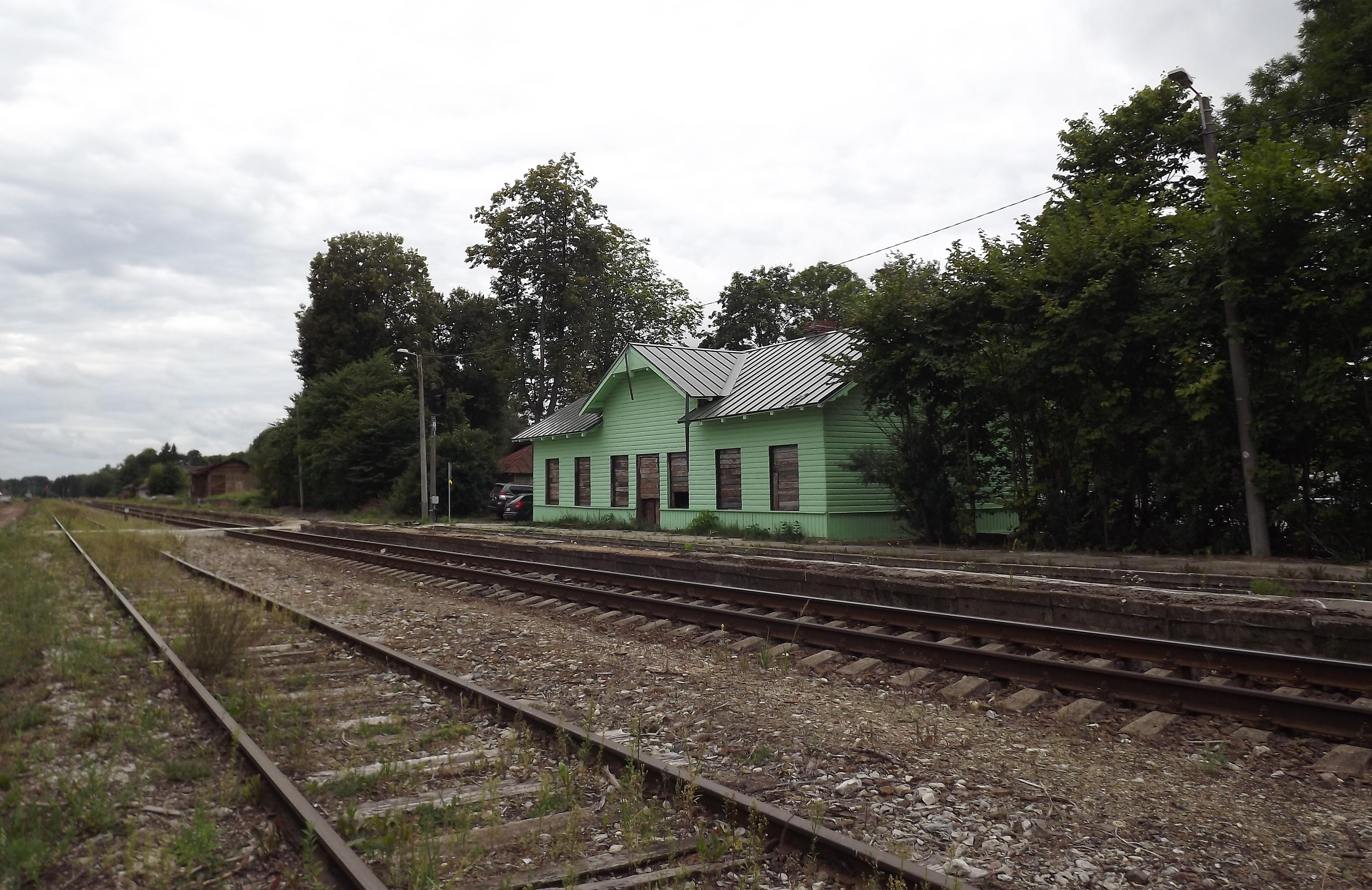 Antsla raudteejaam